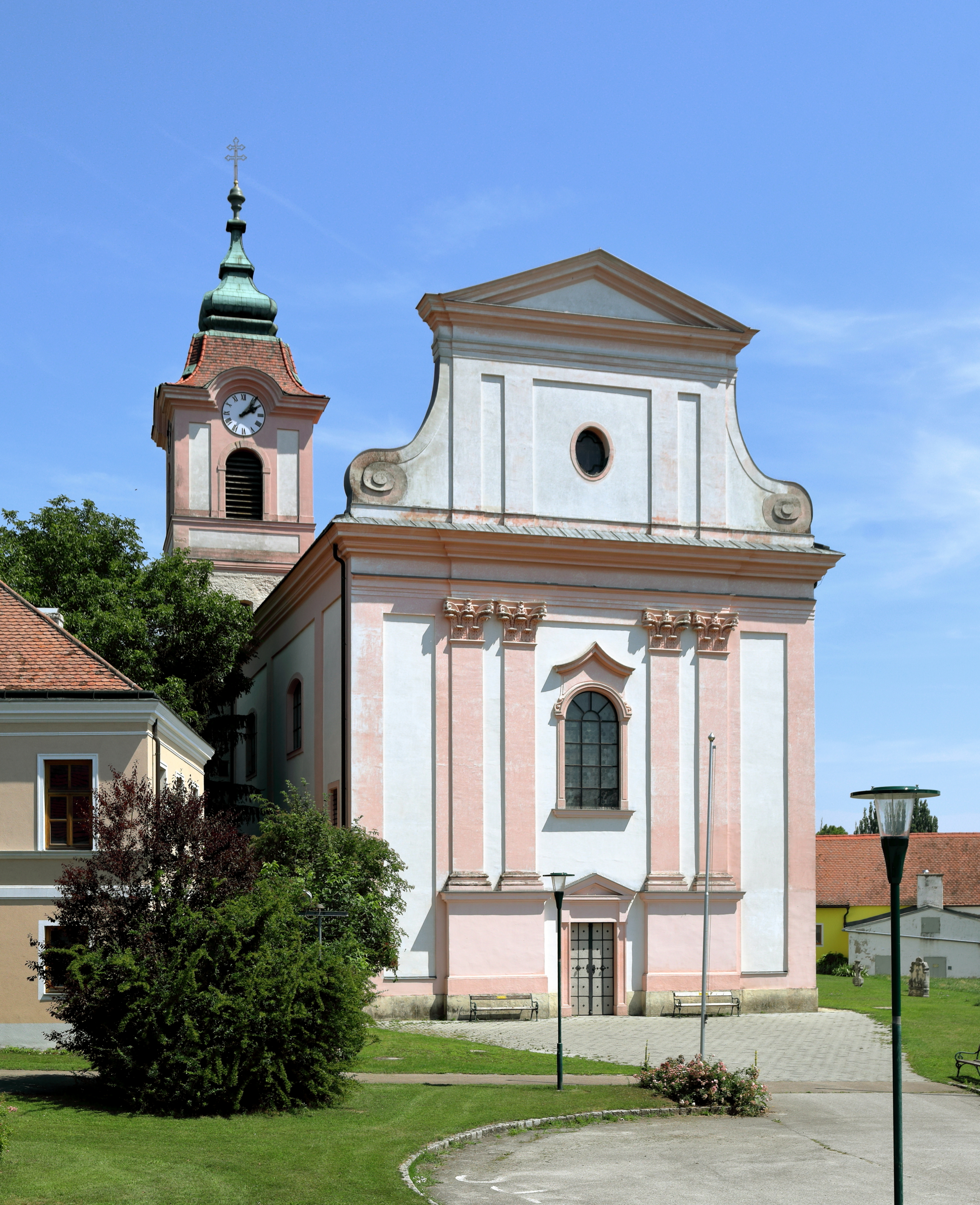 Westansicht der röm.-kath. Pfarrkirche hl. Andreas in Großstelzendorf, ein Ortsteil der niederösterreichischen Marktgemeinde Göllersdorf.